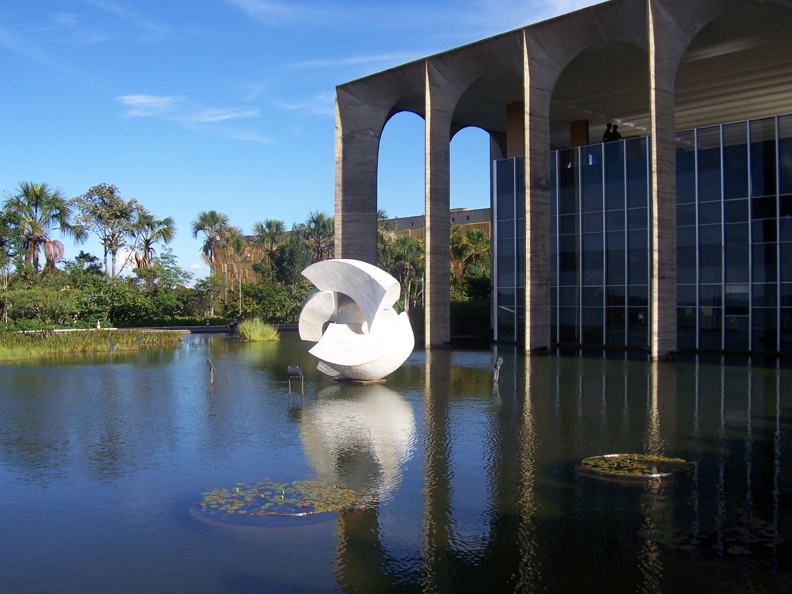 Palácio do Itamaraty no Aniversário de Brasilia em 2008.